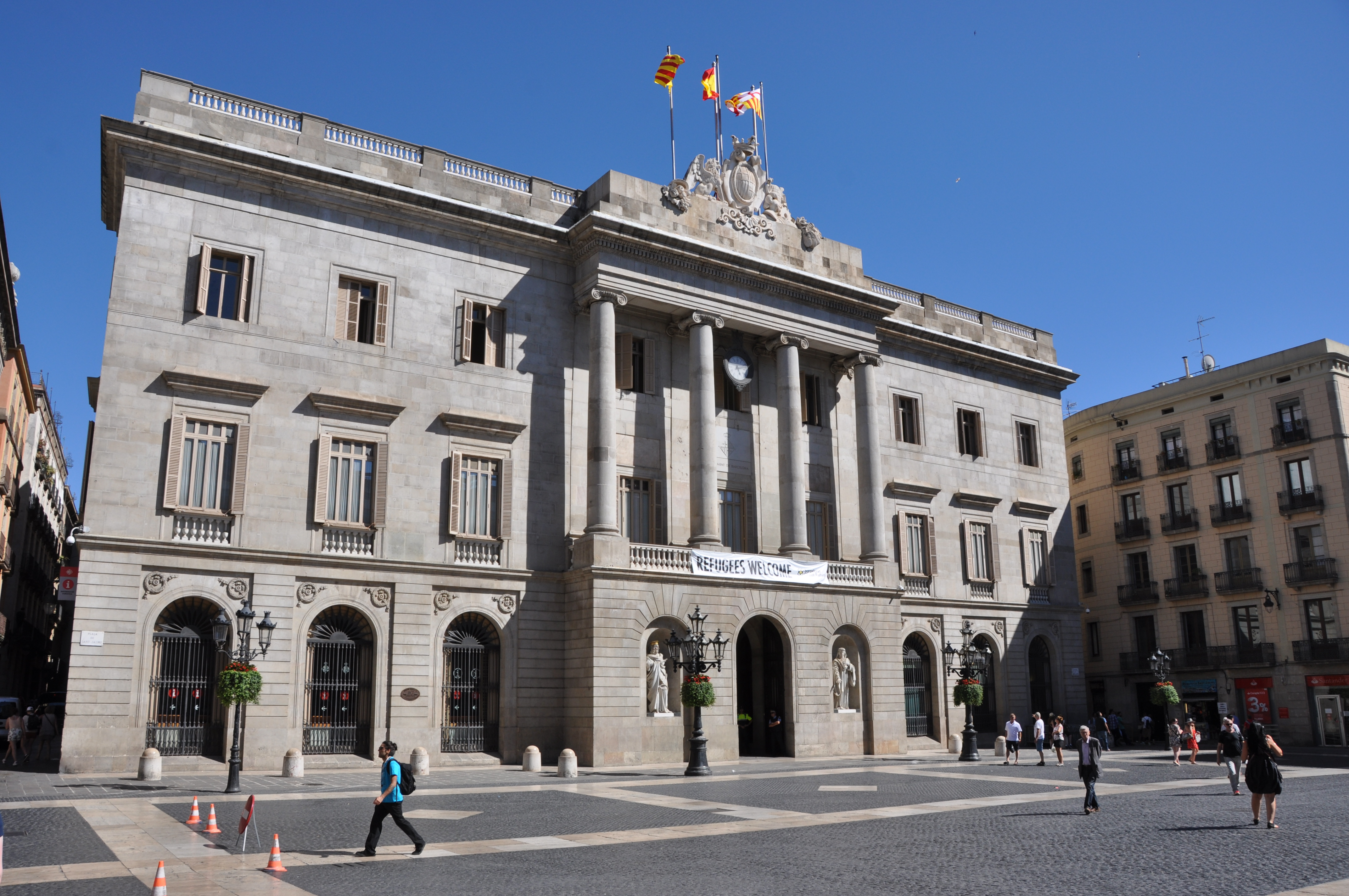 Barcelona (Plaça de Sant Jaume) City Hall. Neoclassical facade. 1831-1847. Josep Mas, architect